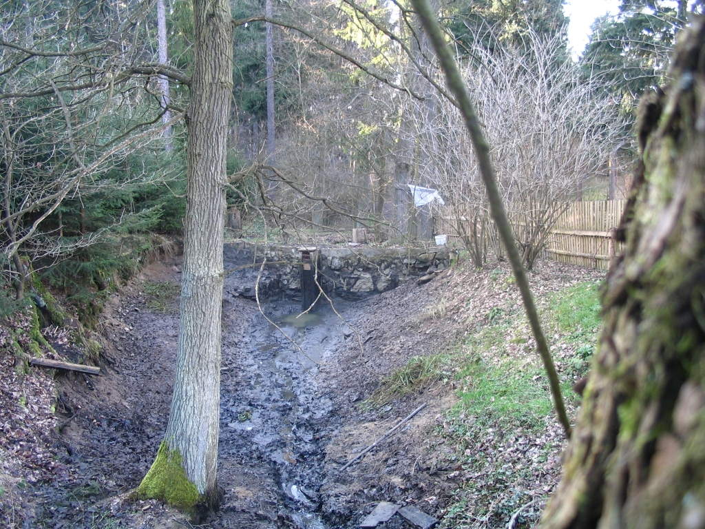 Pozerak prazne